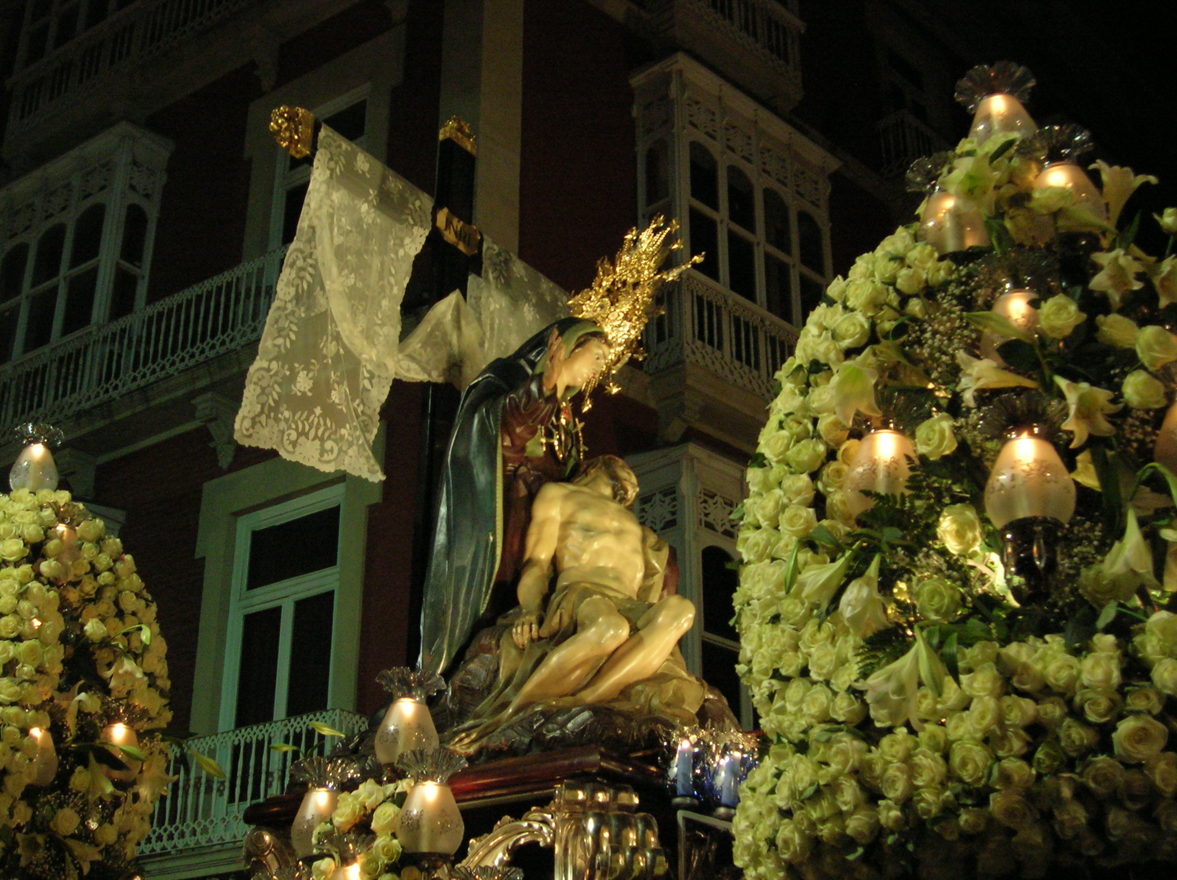 Trono de la Piedad (Marrajos)